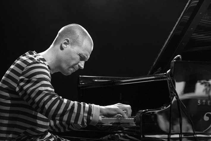 Esbjörn Svensson, swedish jazz pianist